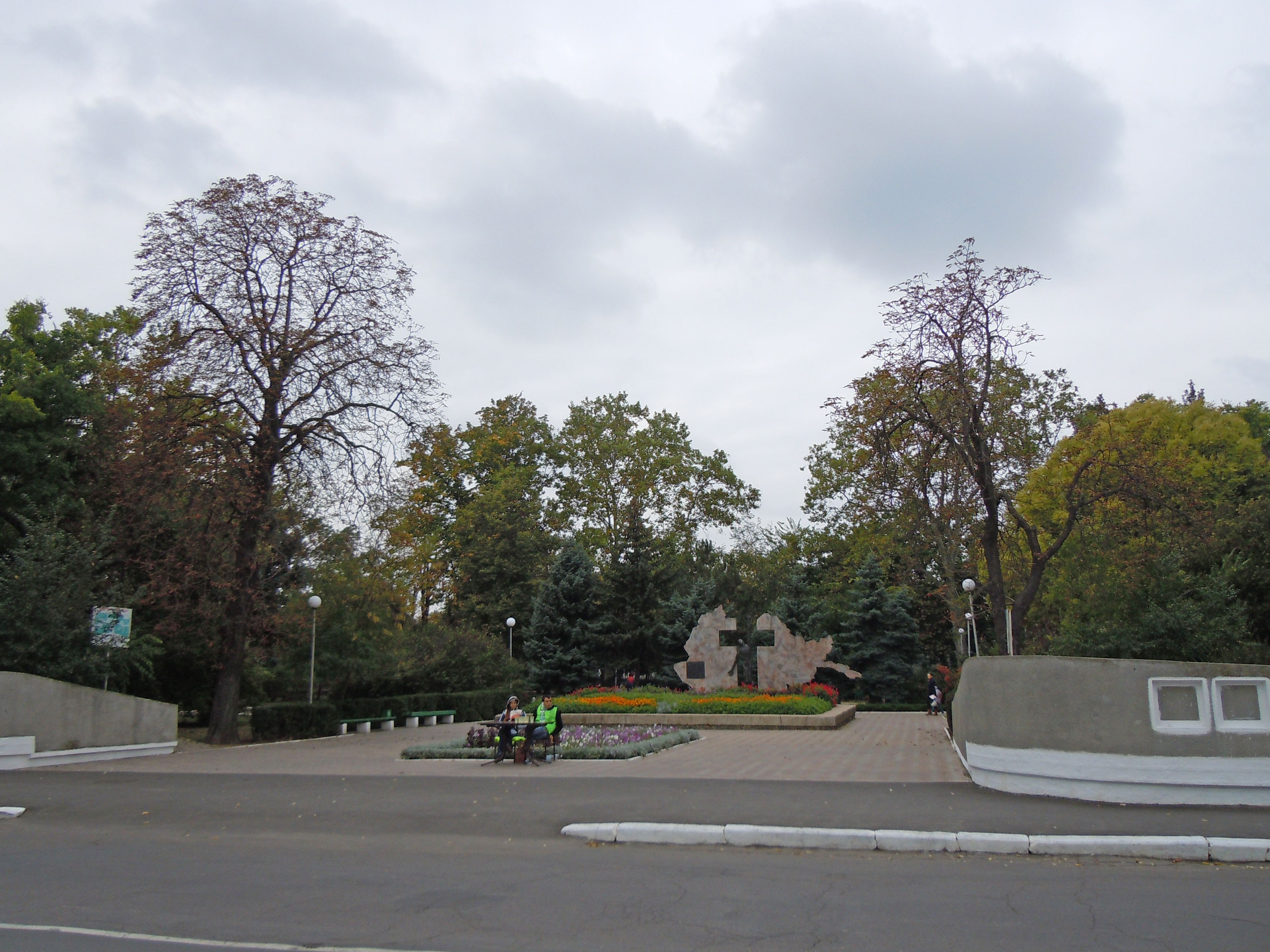 Міський сад з фонтанами та огорожею (бульвар), Ізмаїл, Суворова просп.